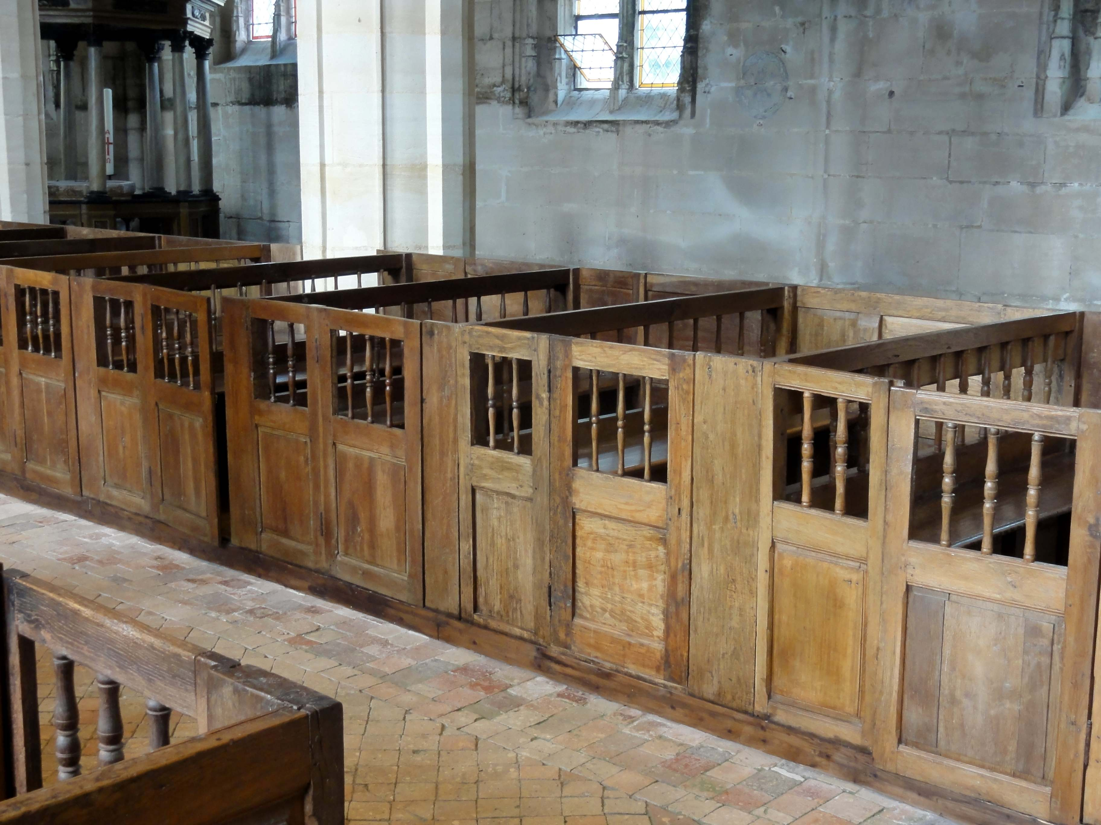 Mobilier de l'église - voir le titre du fichier.